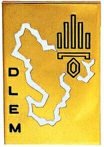 Insigne régimentaire du Détachement de Légion étrangère à Mayotte